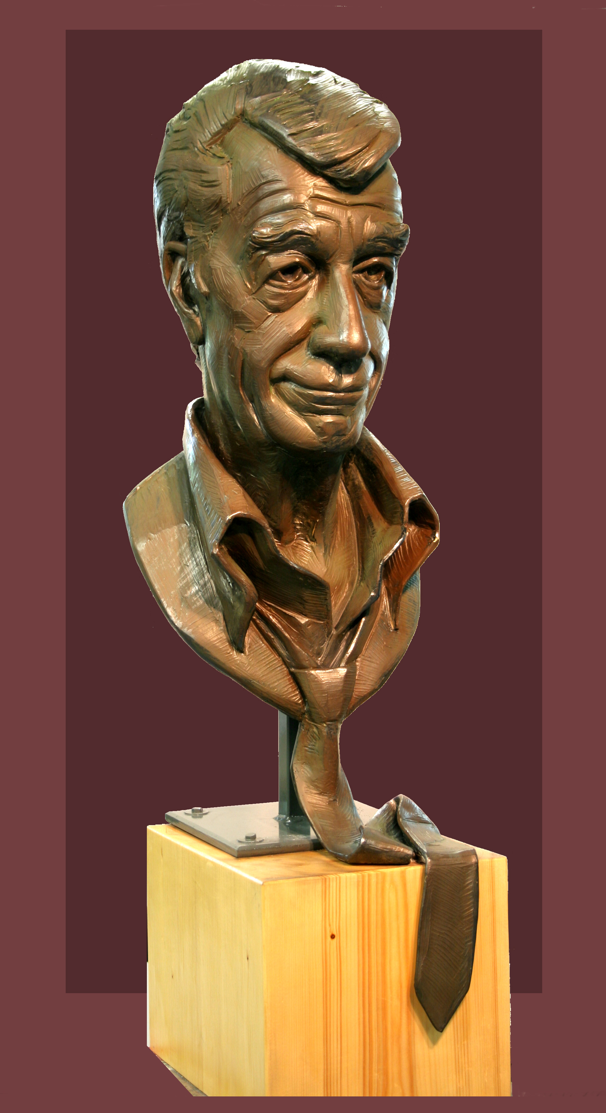 Bildhauer Carsten Eggers hat Rudi Carrell als Büste verewigt